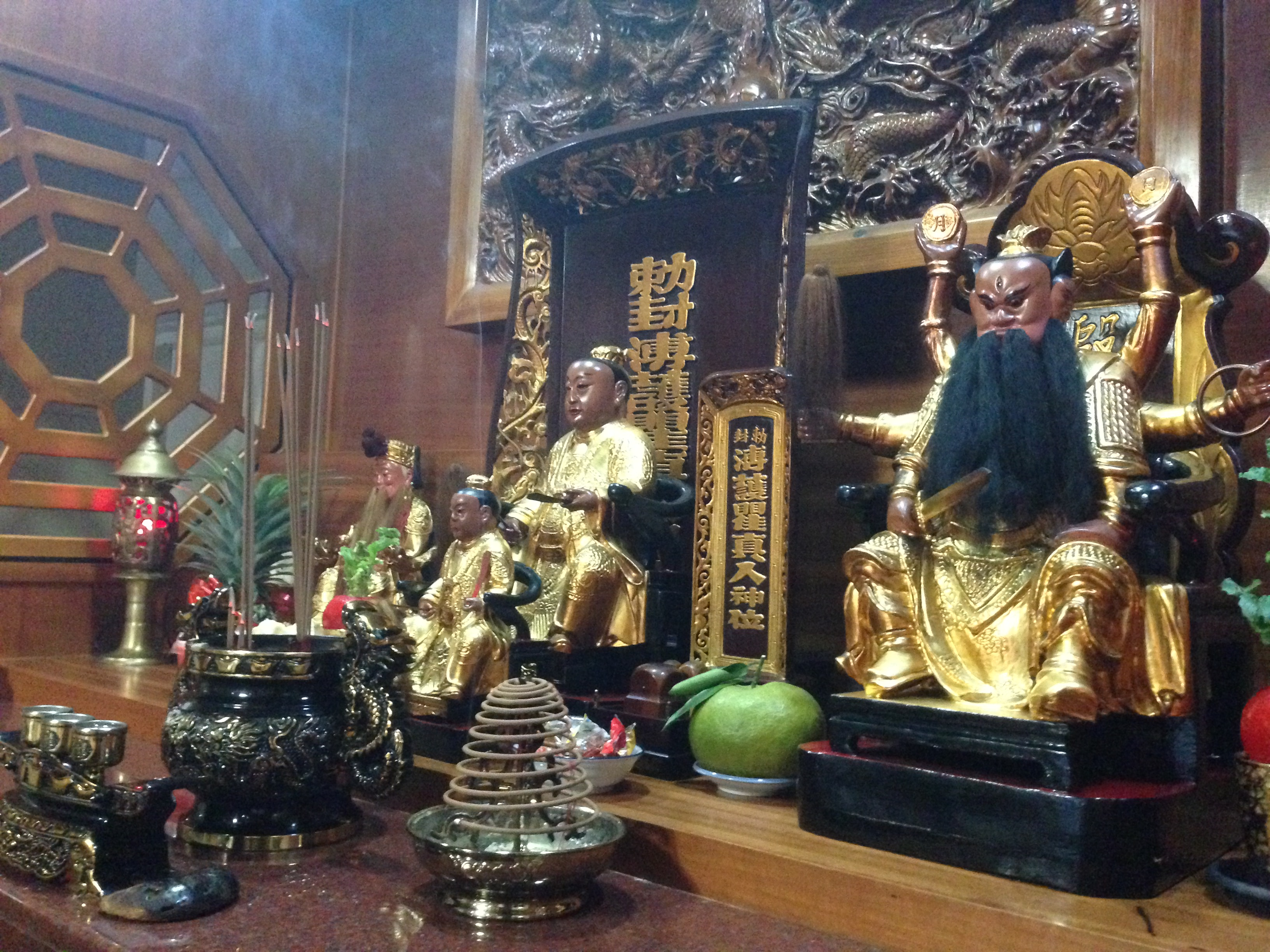 中文（台灣）: 瞿公真人廟神像